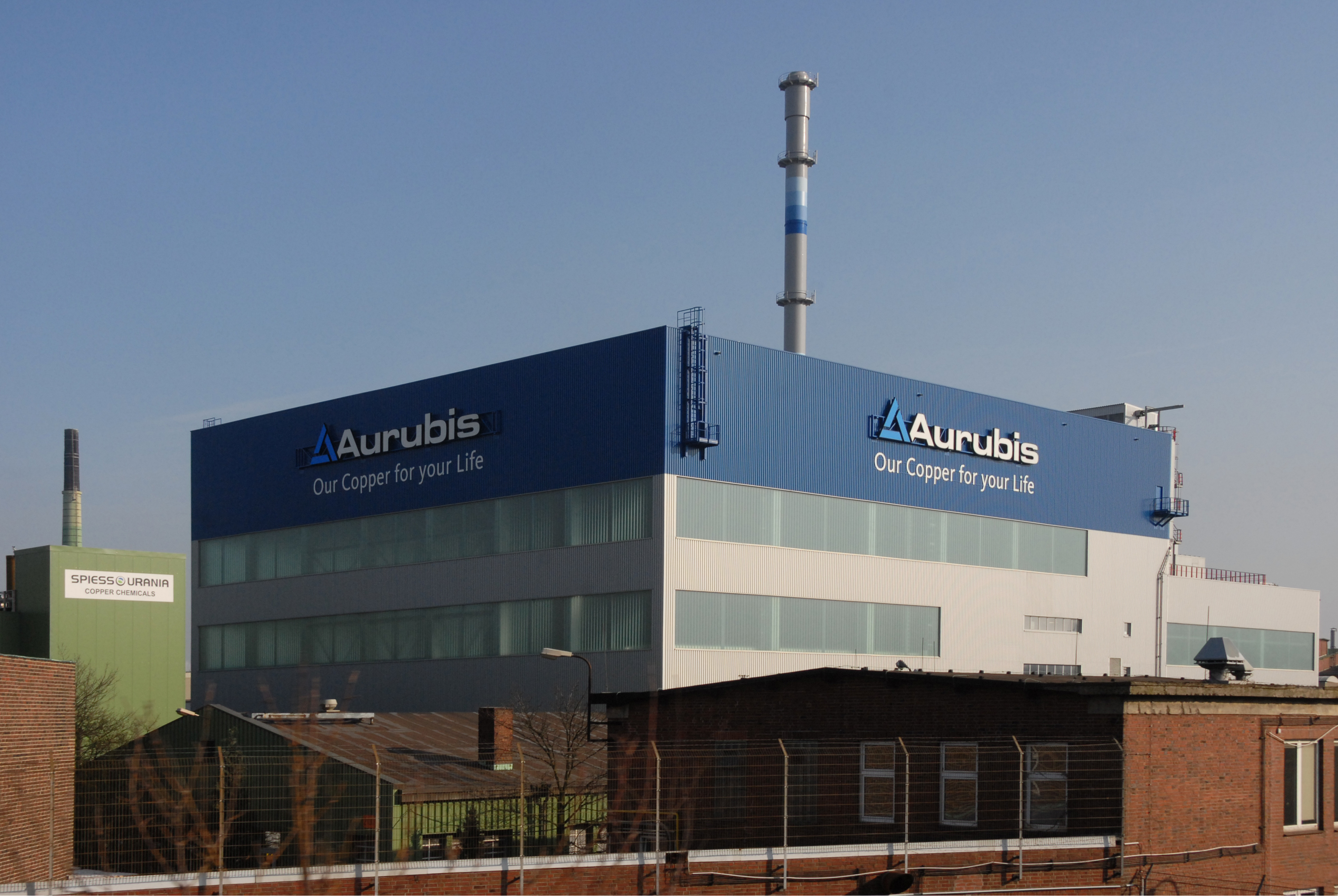 Anodenschlammverarbeitung